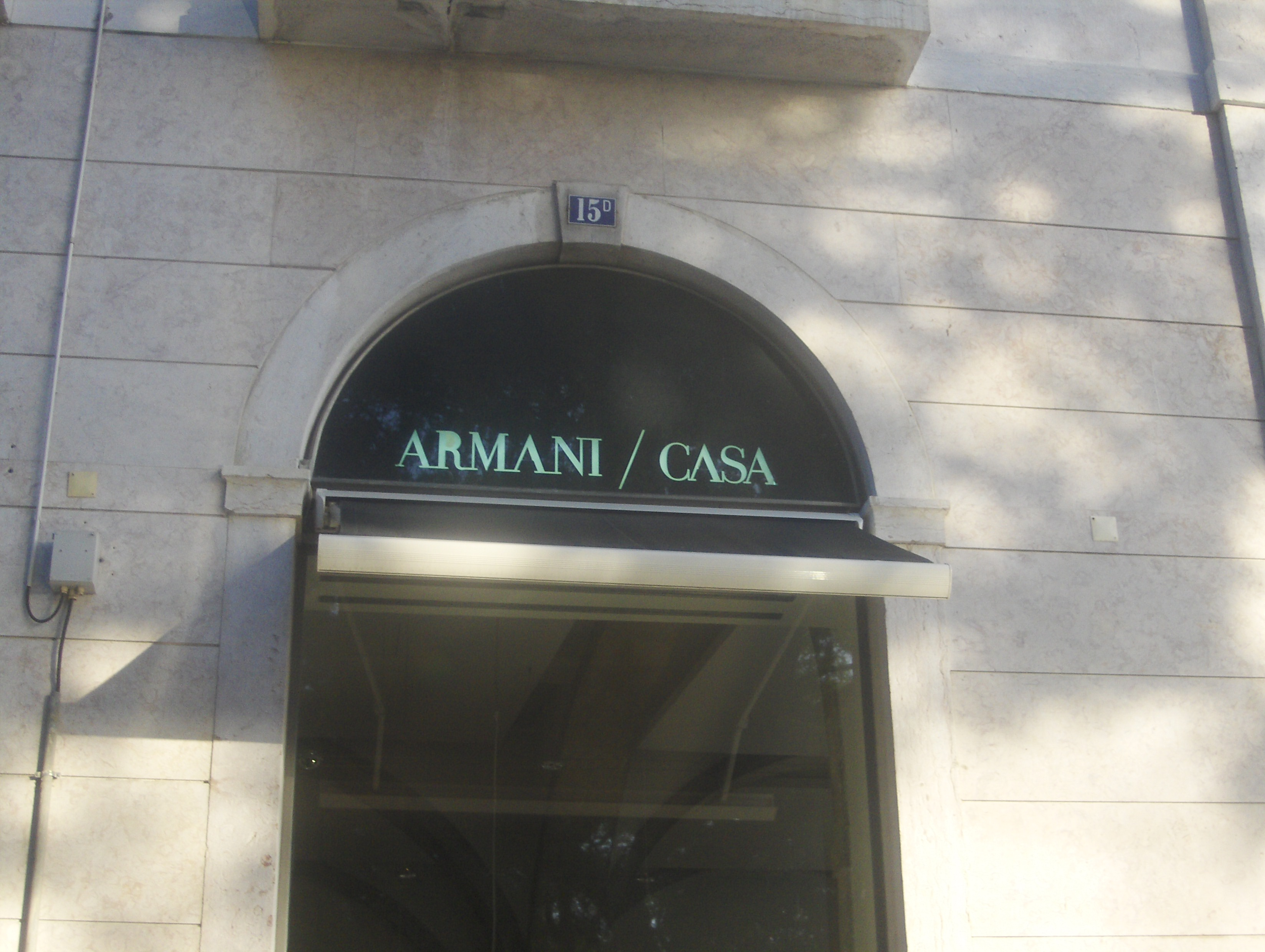 Armani Casa in Lisbon, Alcântra